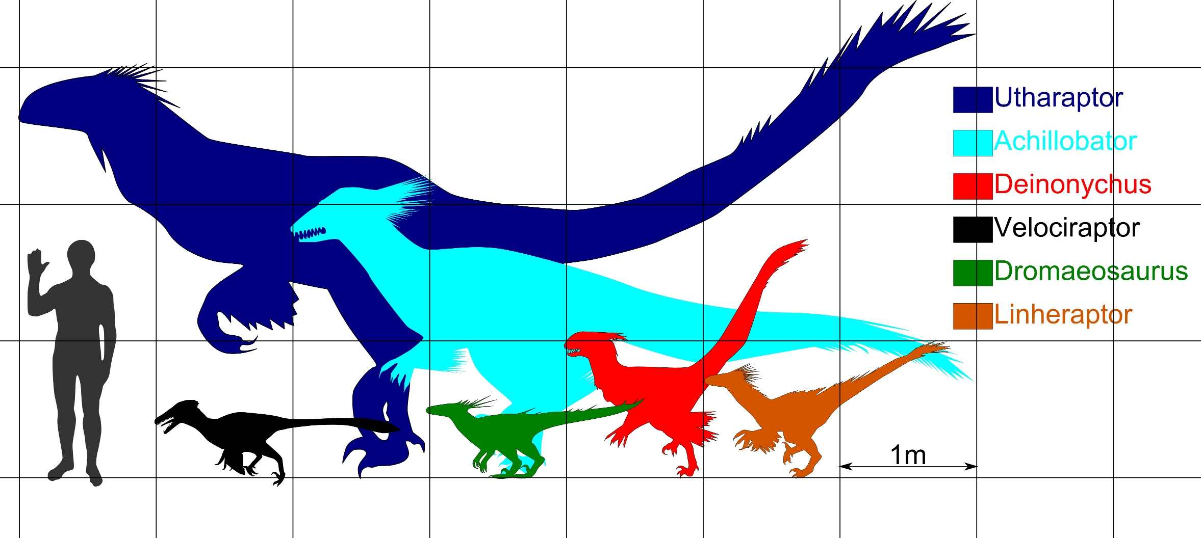 Größenvergleich verschiedener dromaeosaurier und troodontiden